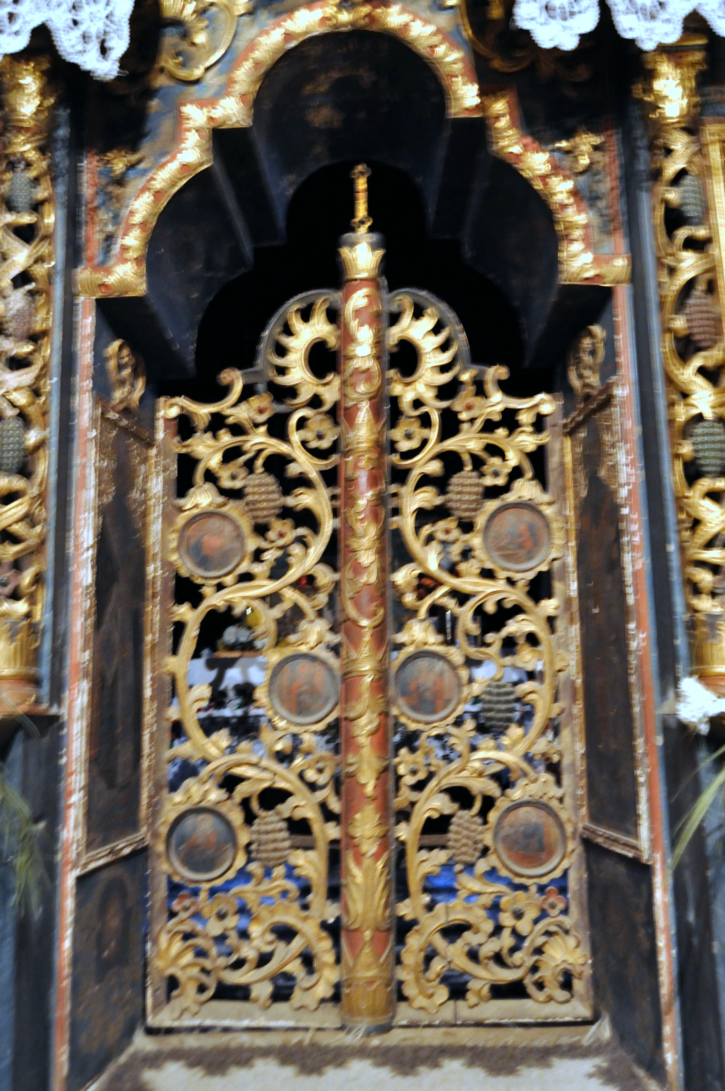 Biserica de lemn „Sfinții Arhangheli Mihail și Gavriil” din Șurdești, județul Maramureș